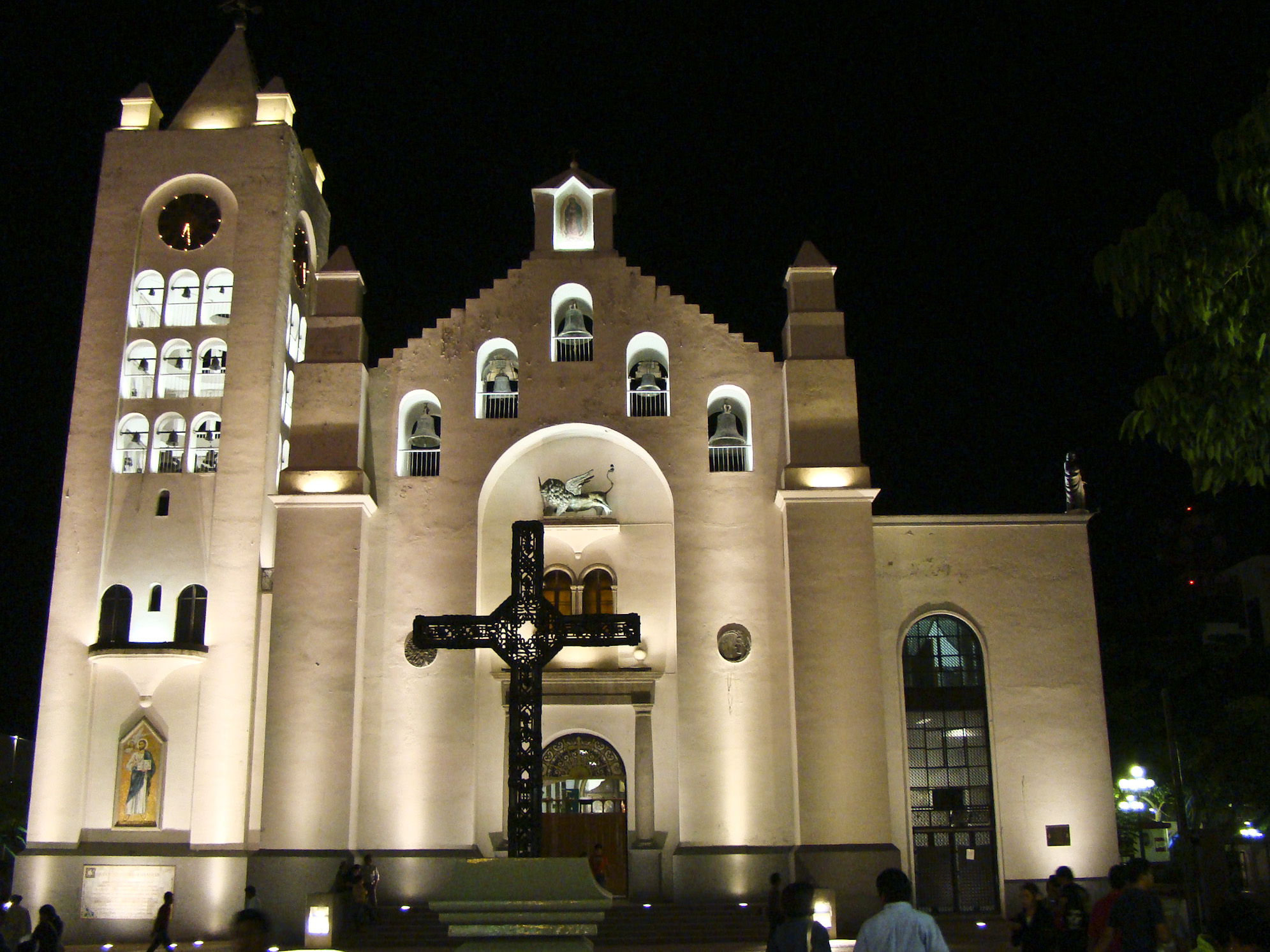 Catedral de San Marcos, Chiapas.